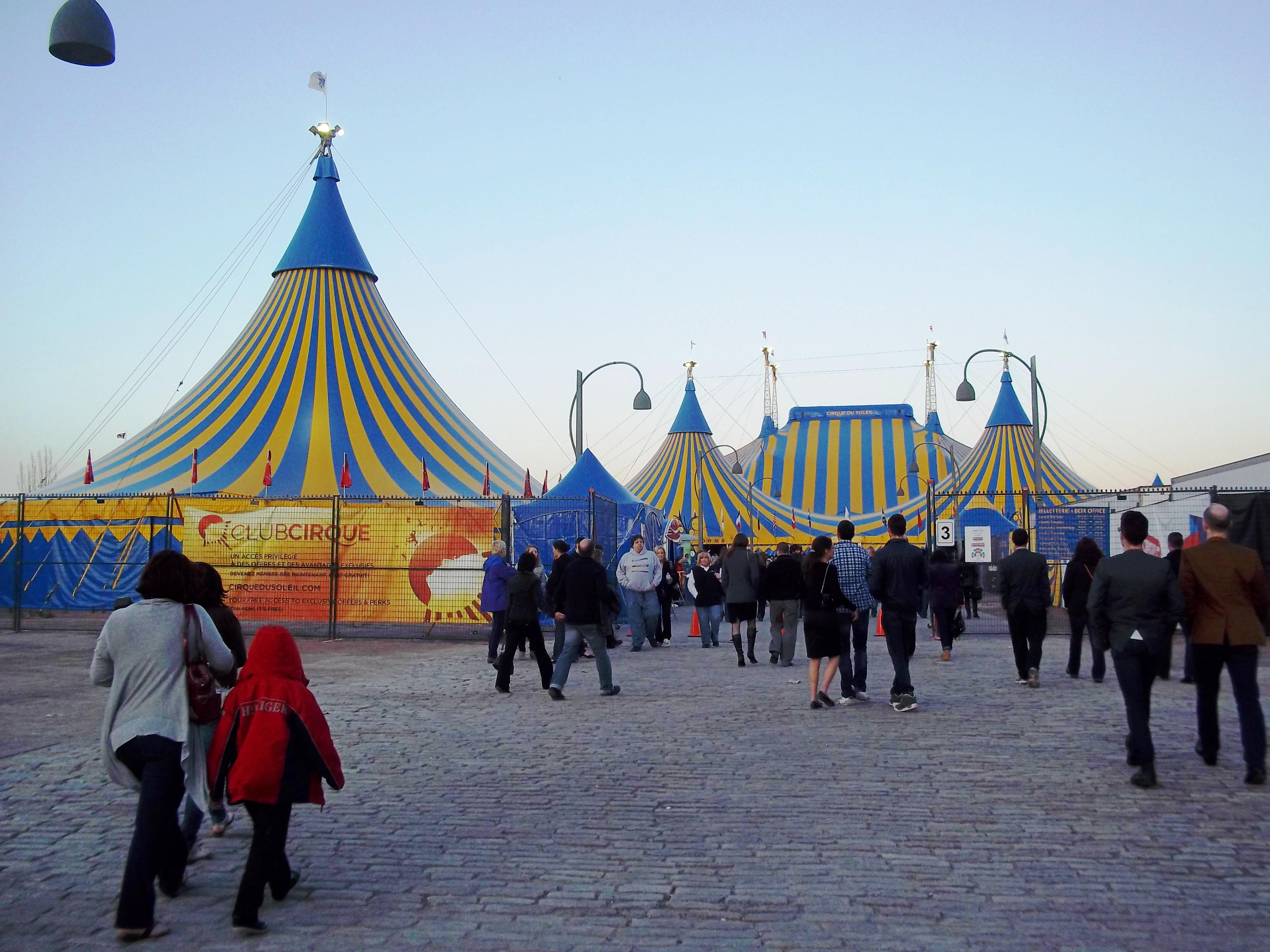 Chapiteau du Cirque du Soleil au Vieux-Port de Montréal.